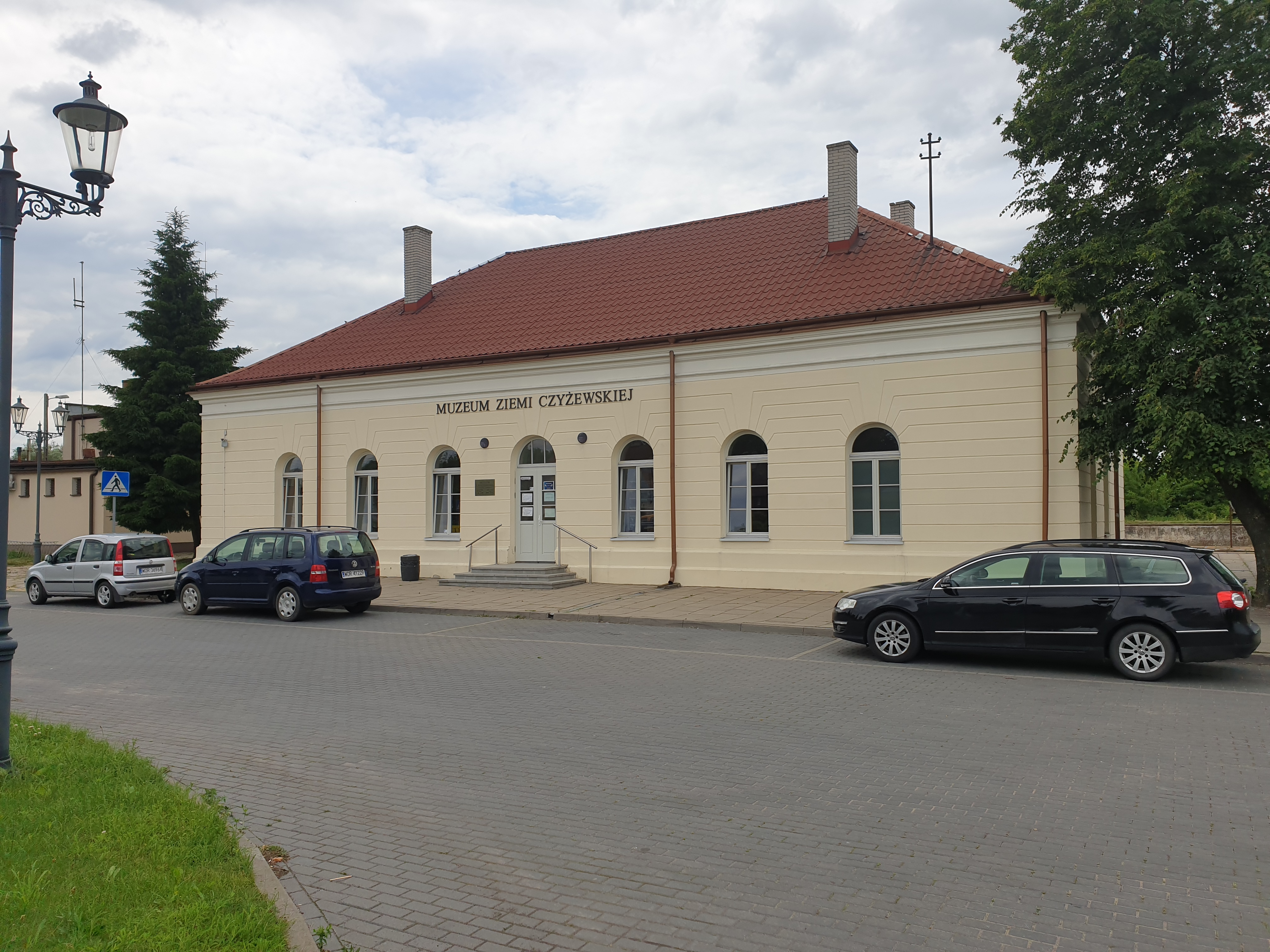 stacja kolejowa Czyżew - budynek dworca widziany od strony parkingu, od 2014 roku siedziba Muzeum Ziemi Czyżewskiej